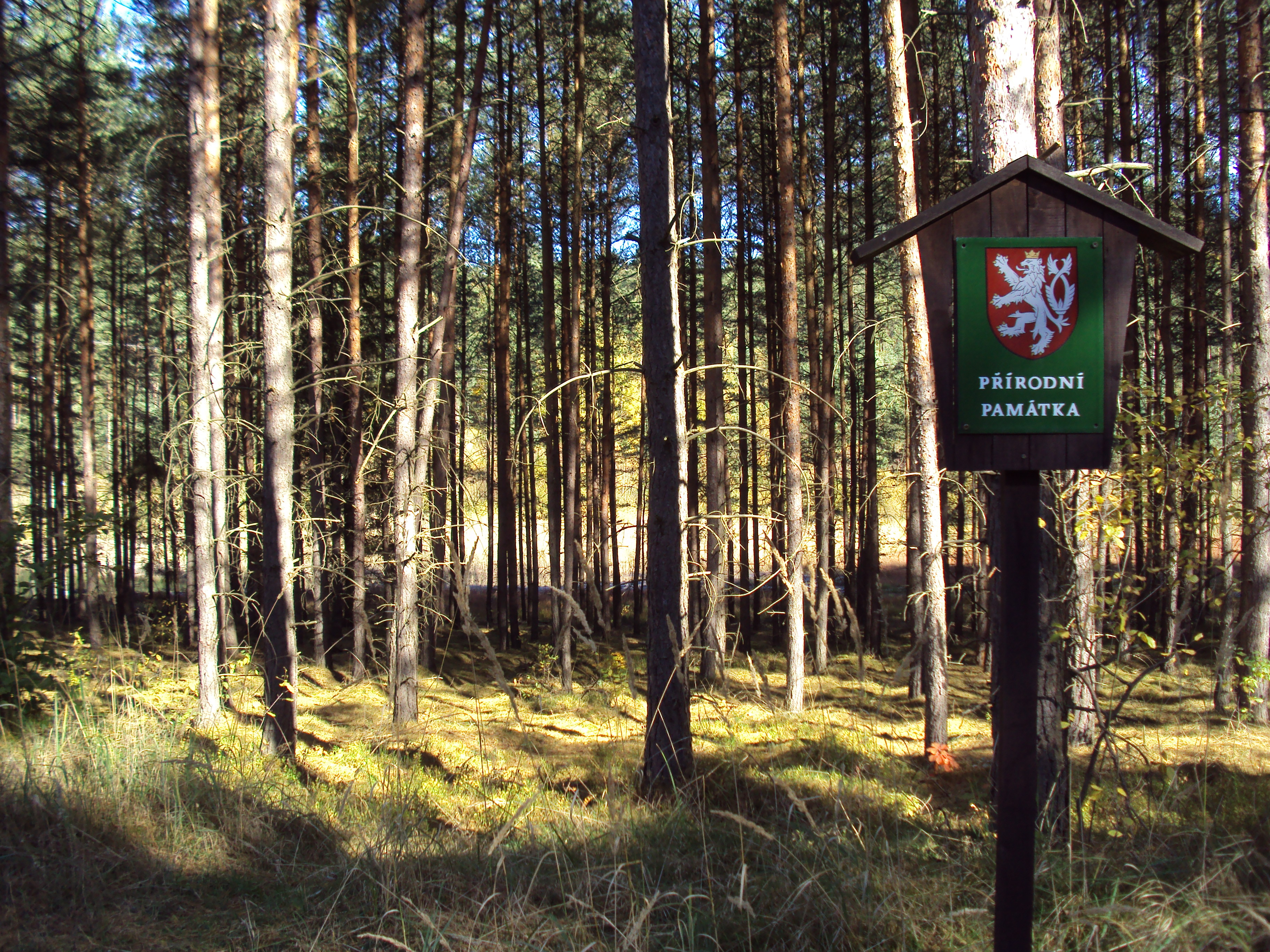 Les na okraji PP Rašeliniště Černého rybníka, asi 1,5 km na jih od Hamru na Jezeře